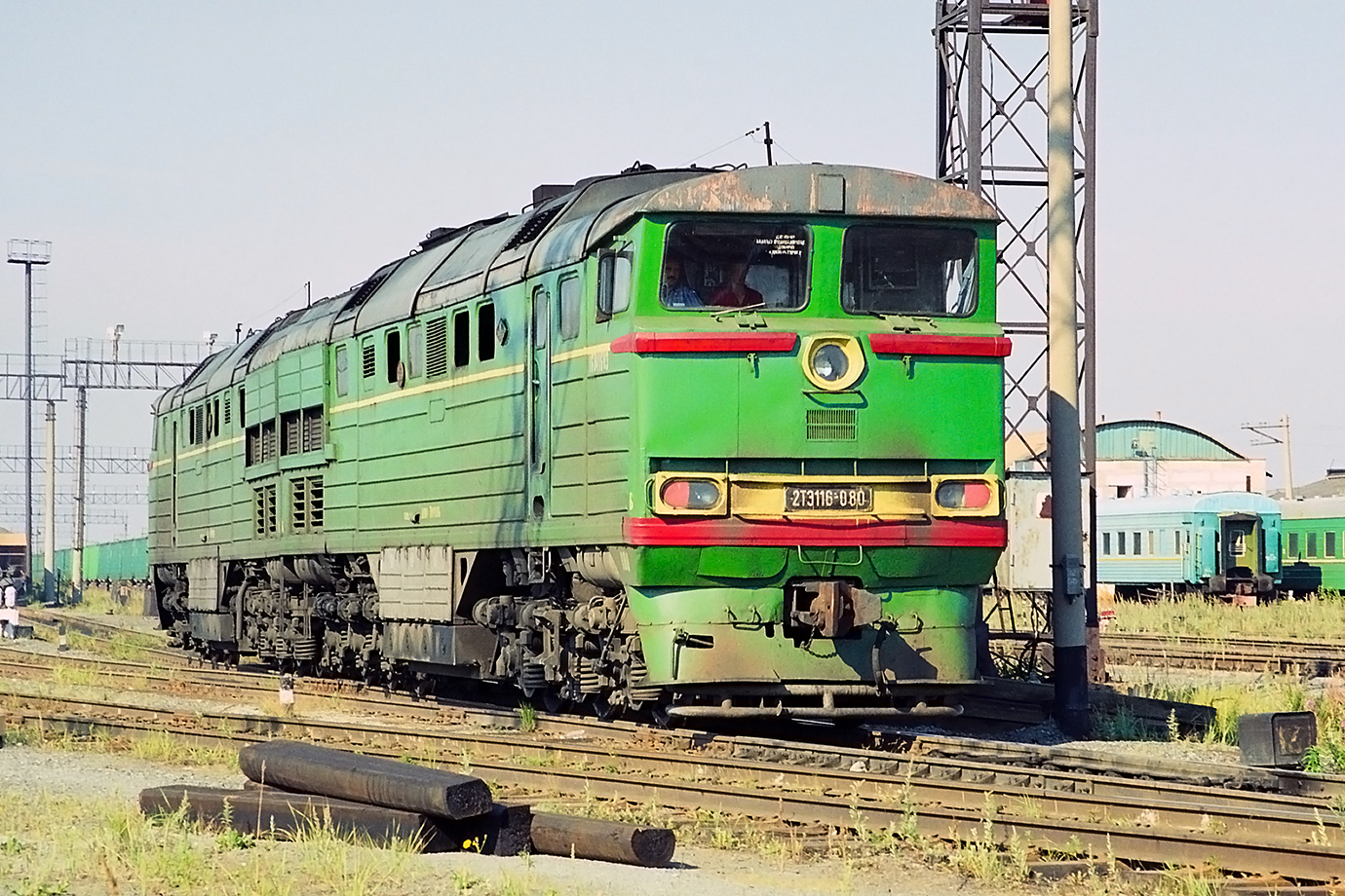 Передан в депо Тюмень примерно в 2007 году В 2009 году номер перебит на 2ТЭ116-201